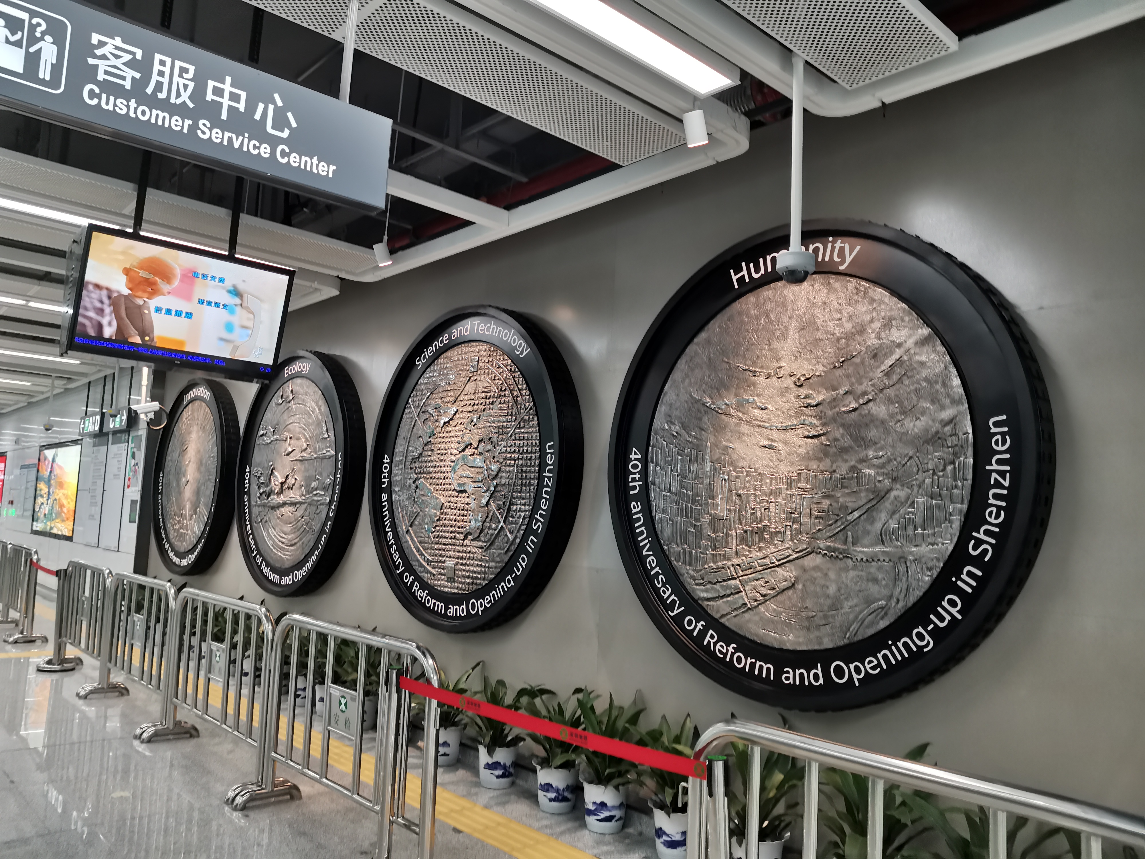 粤海门站艺术墙，以纪念改革开放和深圳建市40周年为主题